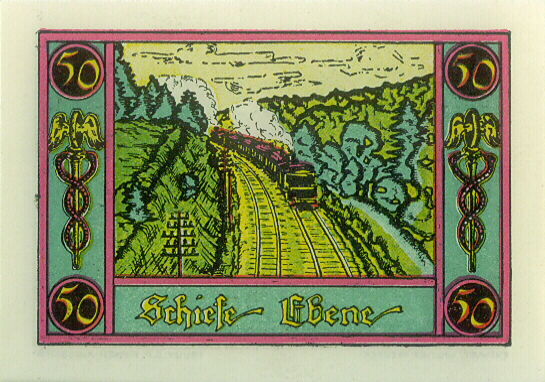 Notgeld aus Marktschorgast: 50 Pfennig von 1921